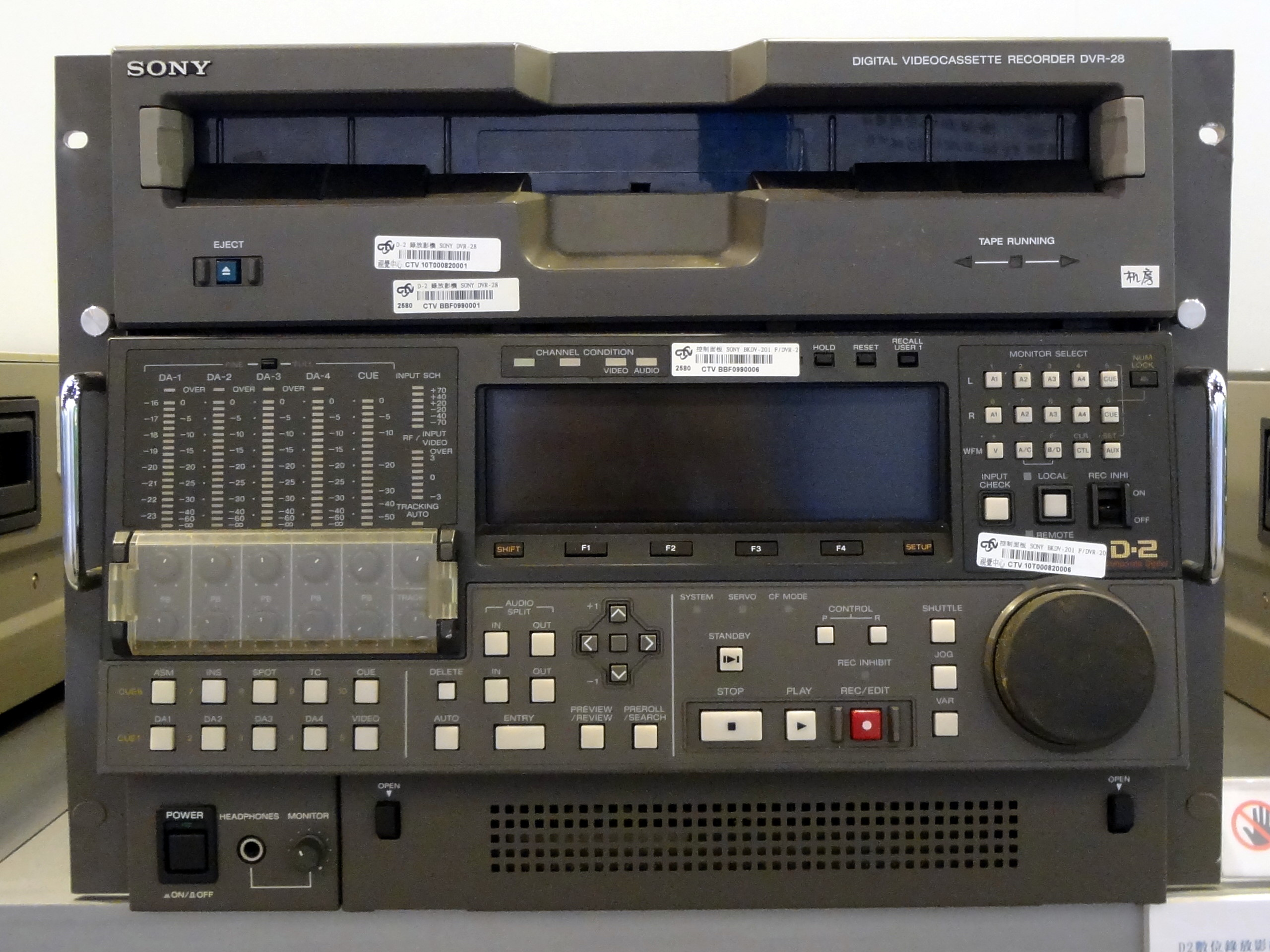 松山文化創意園區「金鐘五十．響」特別展展示品：1991年至2001年，中國電視公司視覺中心使用的Sony D-2數位錄放影機DVR-28加控制面板BKDV-201。